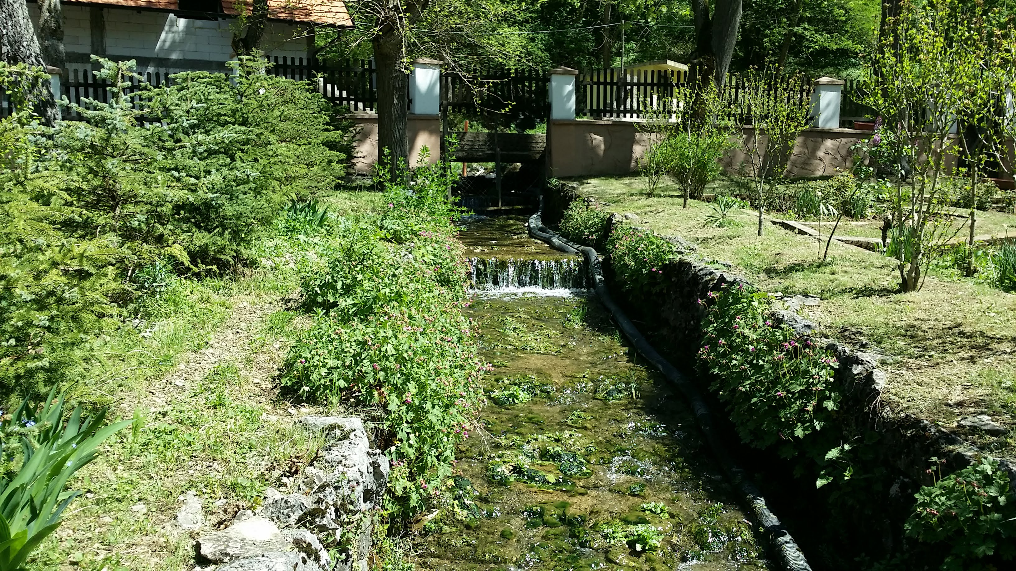 potok